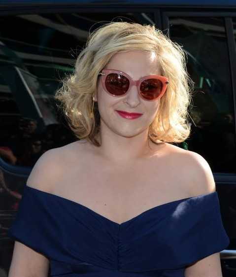 Marilou Berry au festival de Cannes